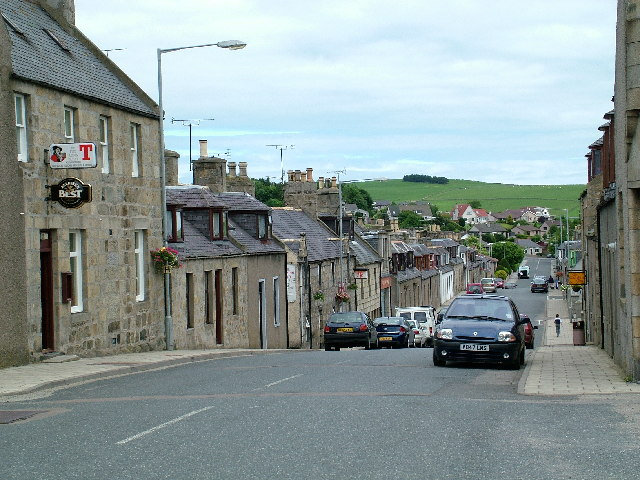 Main Street, Aberchirder, Aberdeenshire